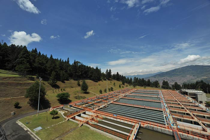 Planta de potabilizacion Manantiales